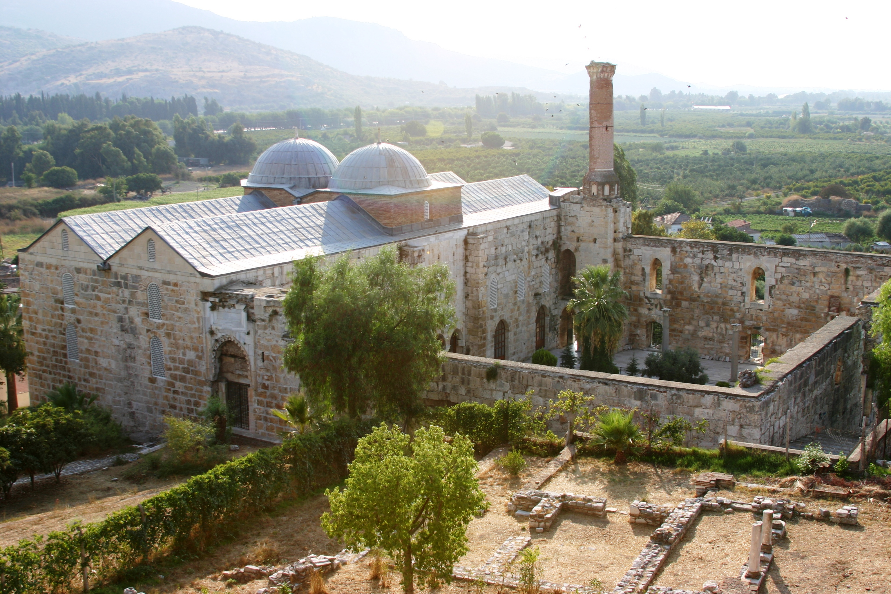 Mesquita de Isabey, próxima ao túmulo de São João, em Éfeso.